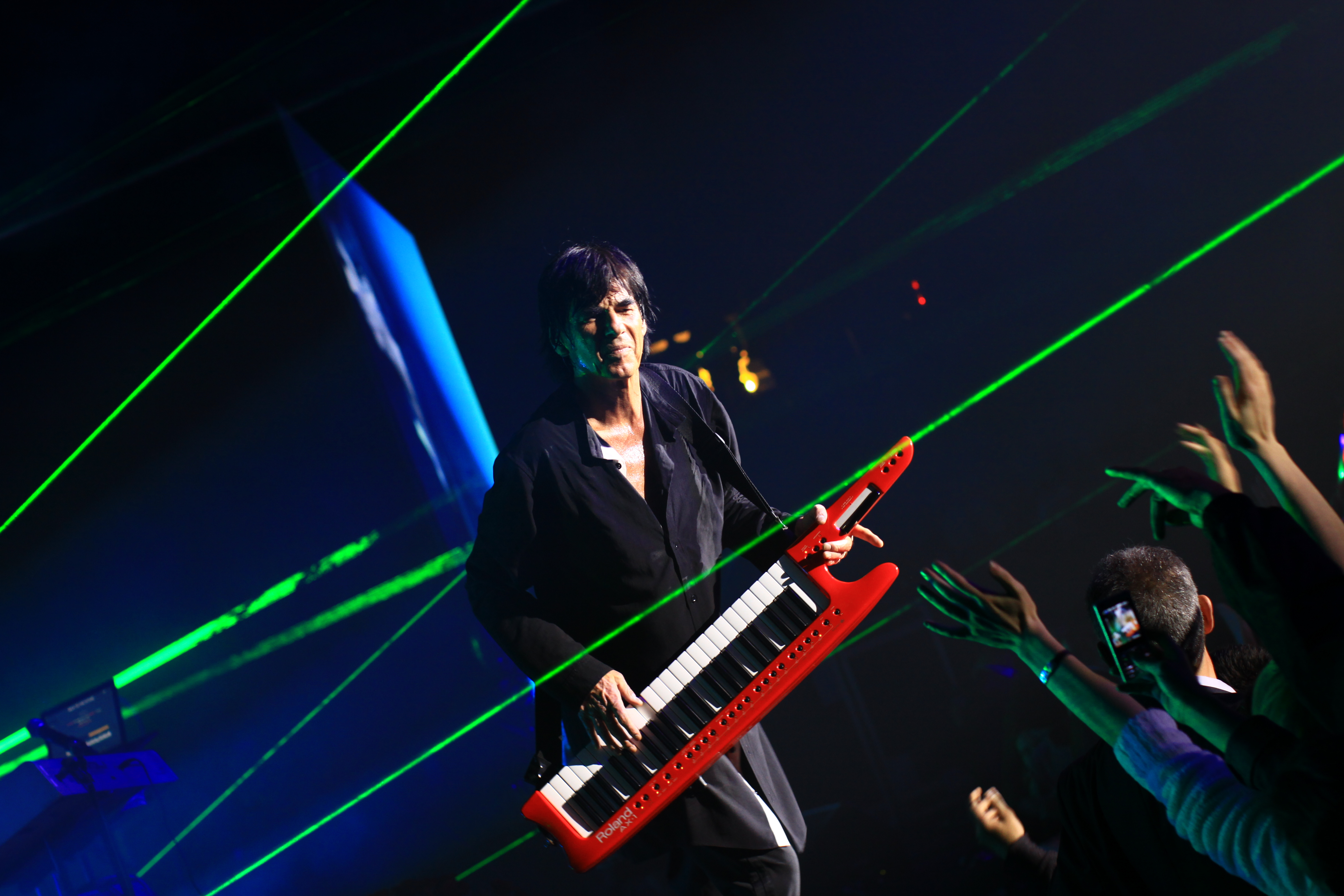 Didier Marouani lors d'un concert à Erevan en Arménie.